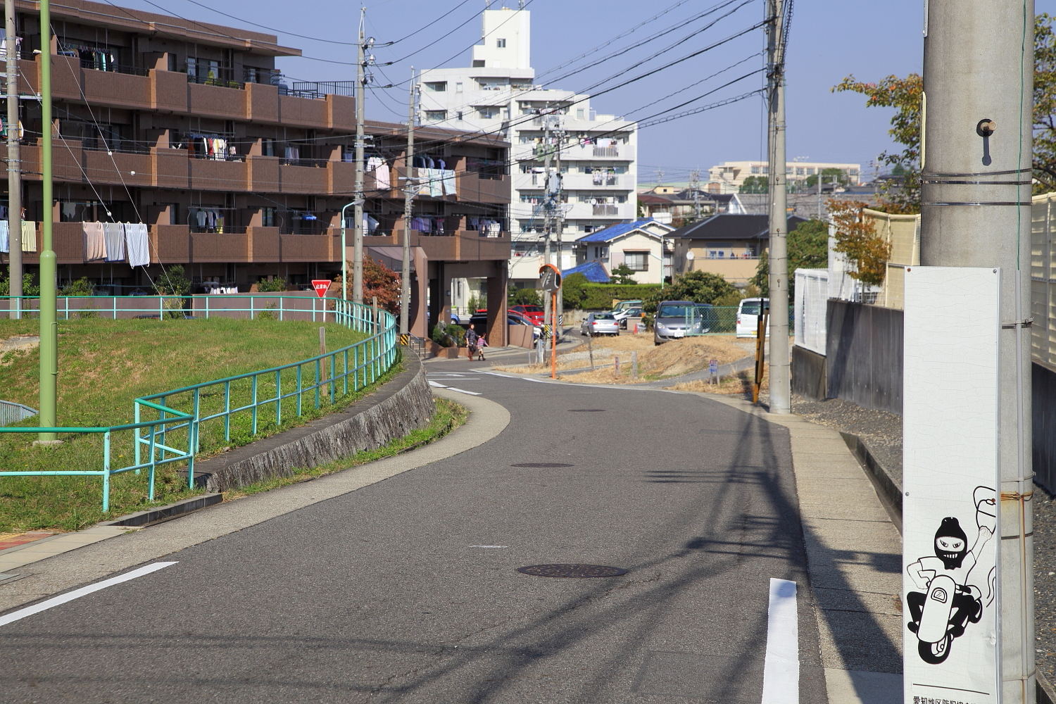 近崎道（名古屋市緑区武路町、2012年）